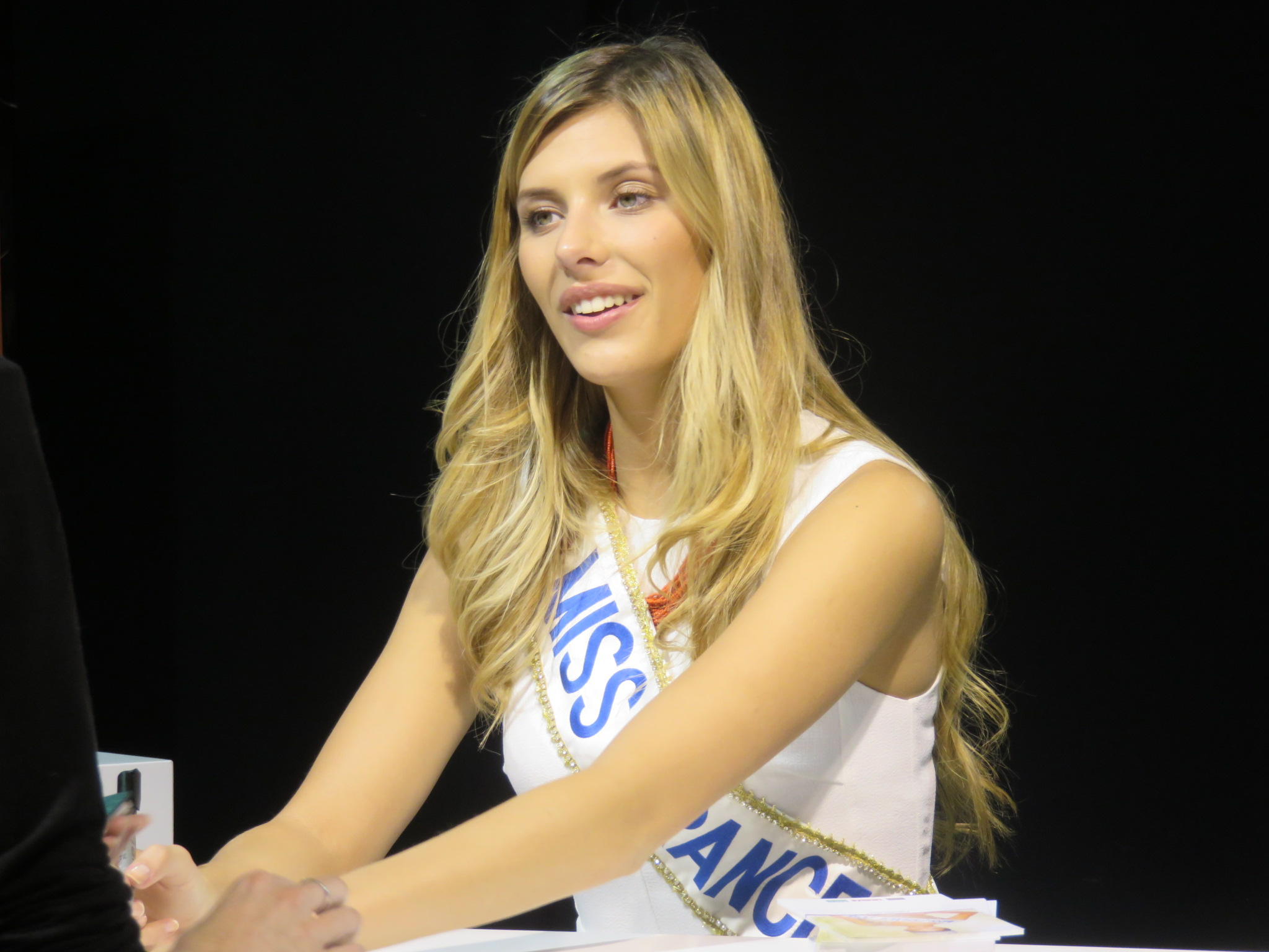 Camille Cerf, miss France 2015, lors d'une séance de dédicace publique